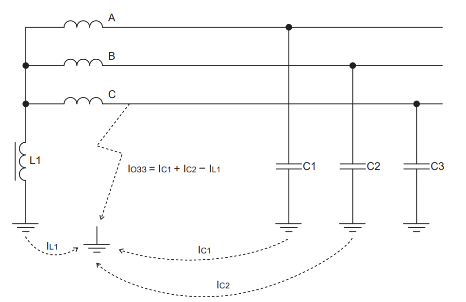 Иллюстрация процесса однофазного замыкания на землю